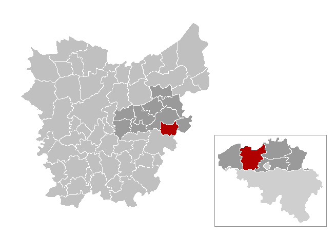 Gemeentekaart, eigen werk Categorie:Kaart met locatie Belgische gemeente